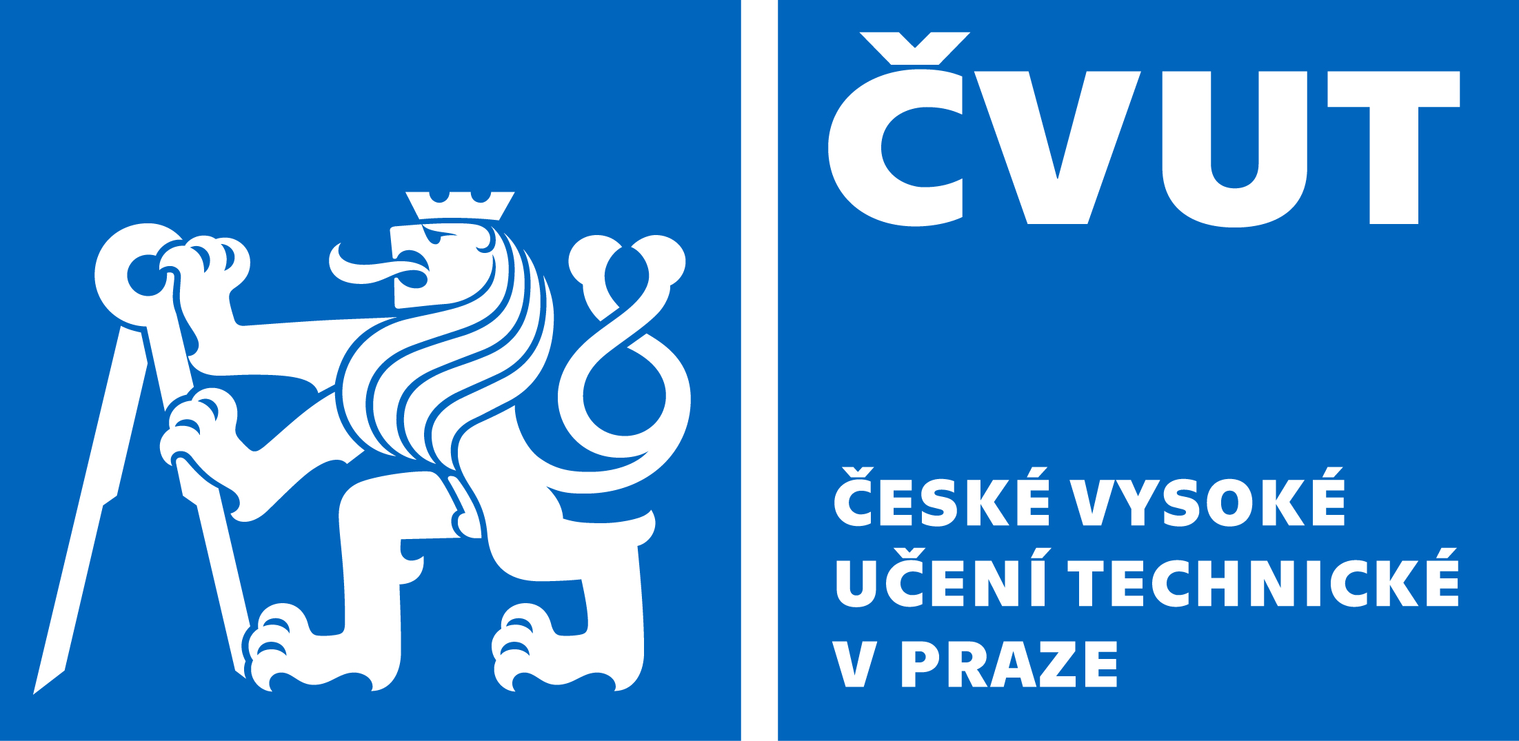 Logo Českého vysokého učení technického v Praze